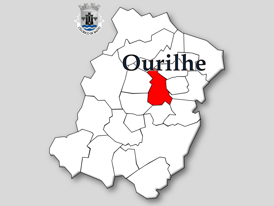 Censos 1864/2011